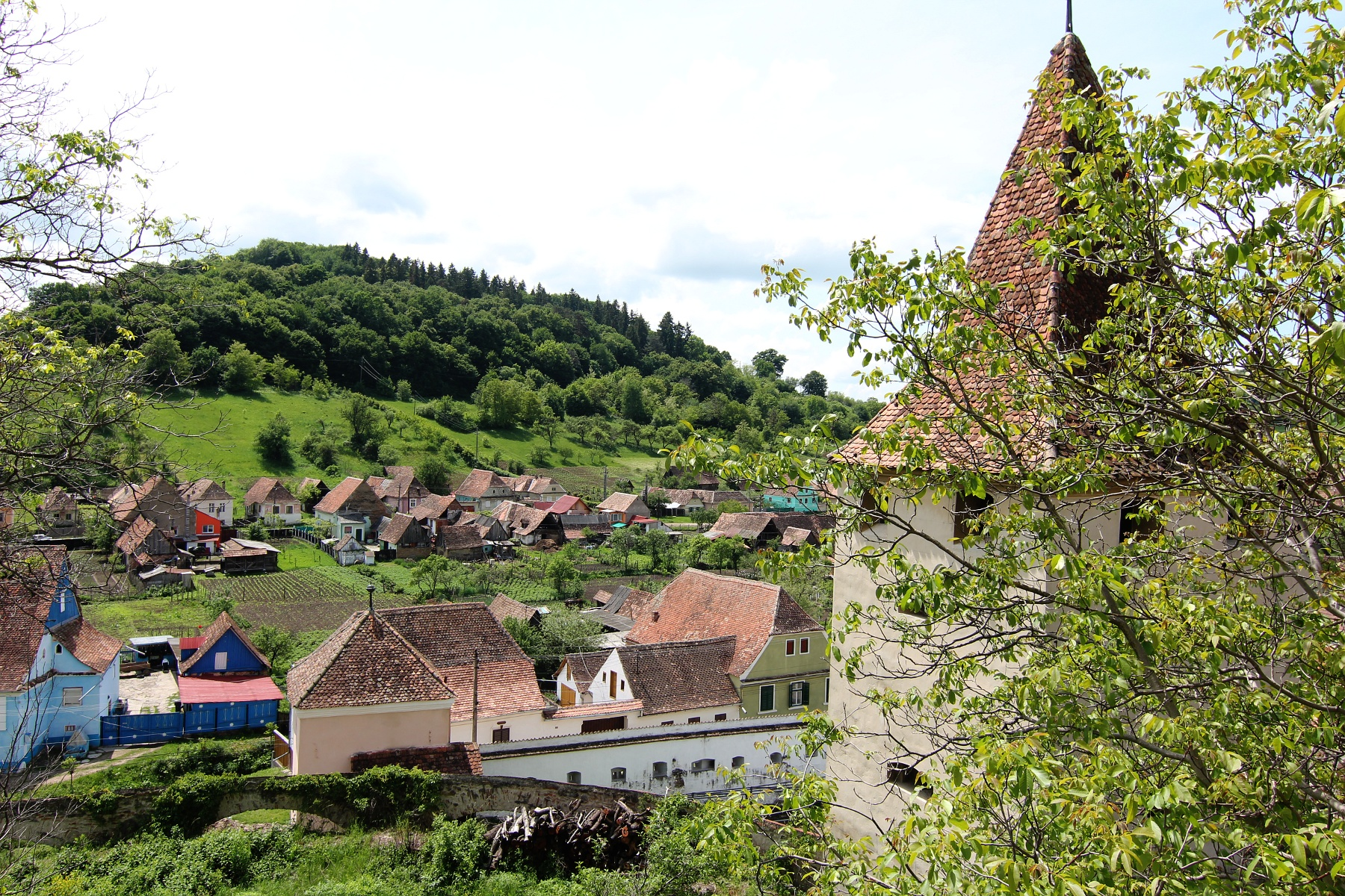 Biertan: Incintă fortificată exterioară, cu turn, turn de poartă, zwinger 04